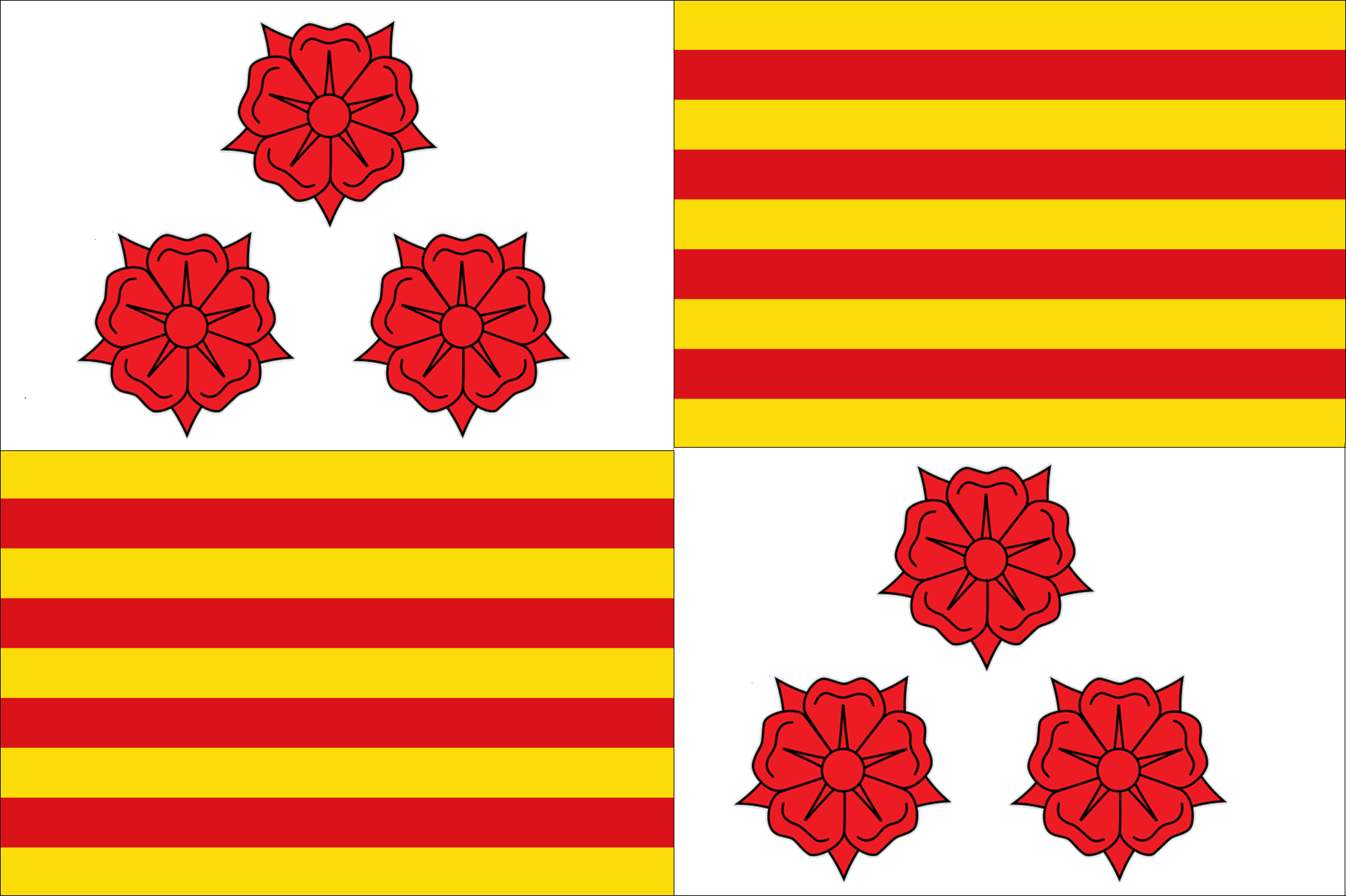 Bandera dels Prats de Rei.